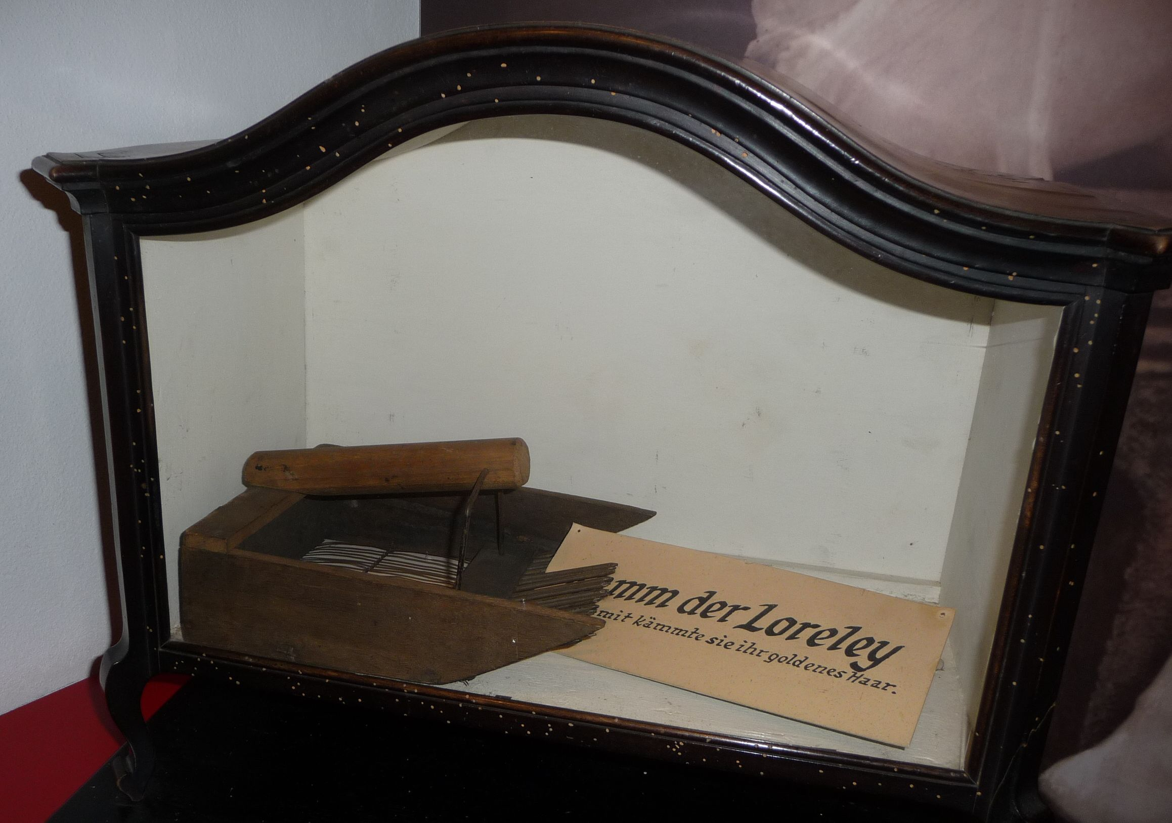 "Kamm der Loreley - Damit kämmte sie ihr goldenes Haar." - Karl-Valentin-Museum in München